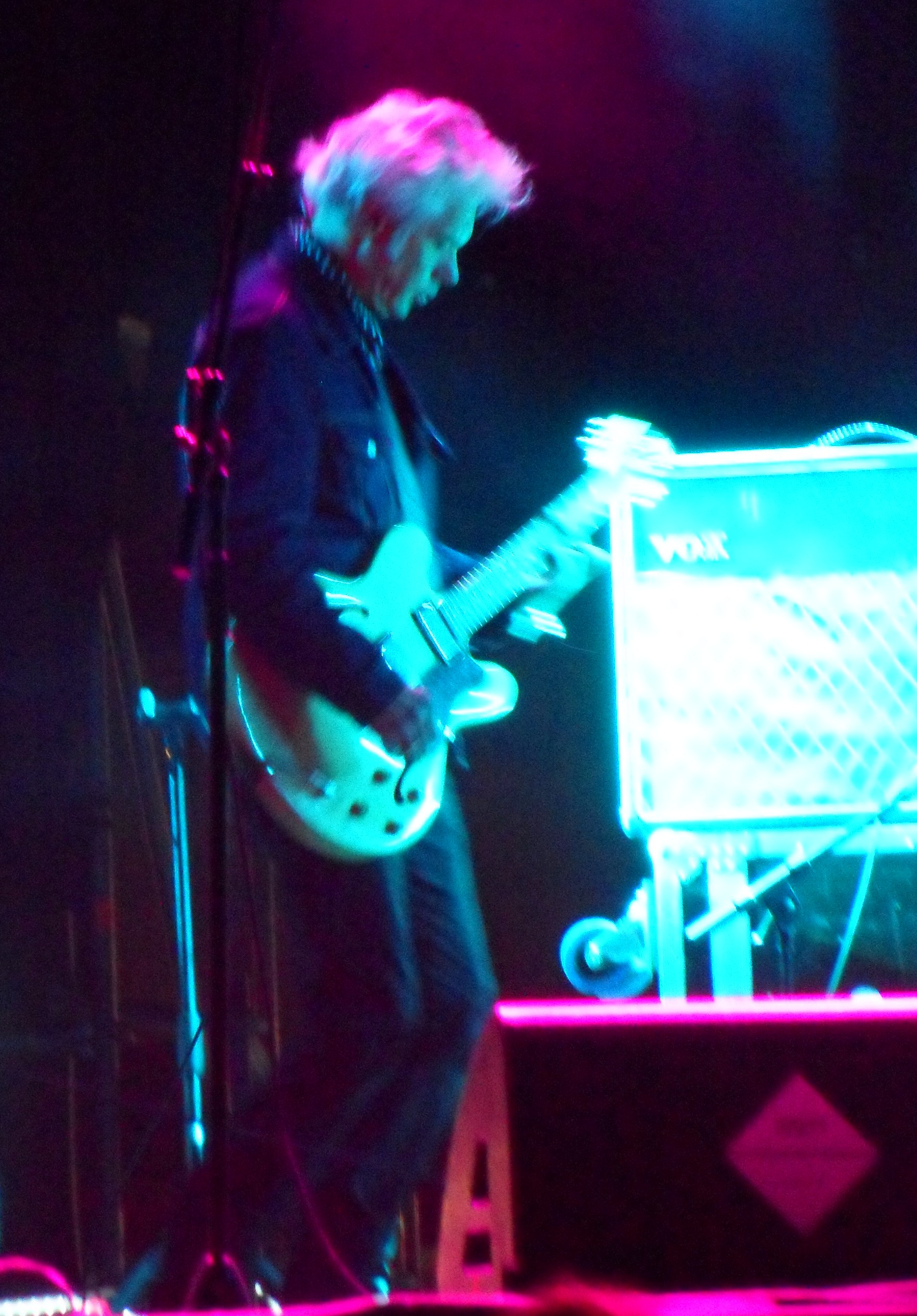 Jim Jarmusch auf dem Festival Primavera Sound 2013 in Barcelona